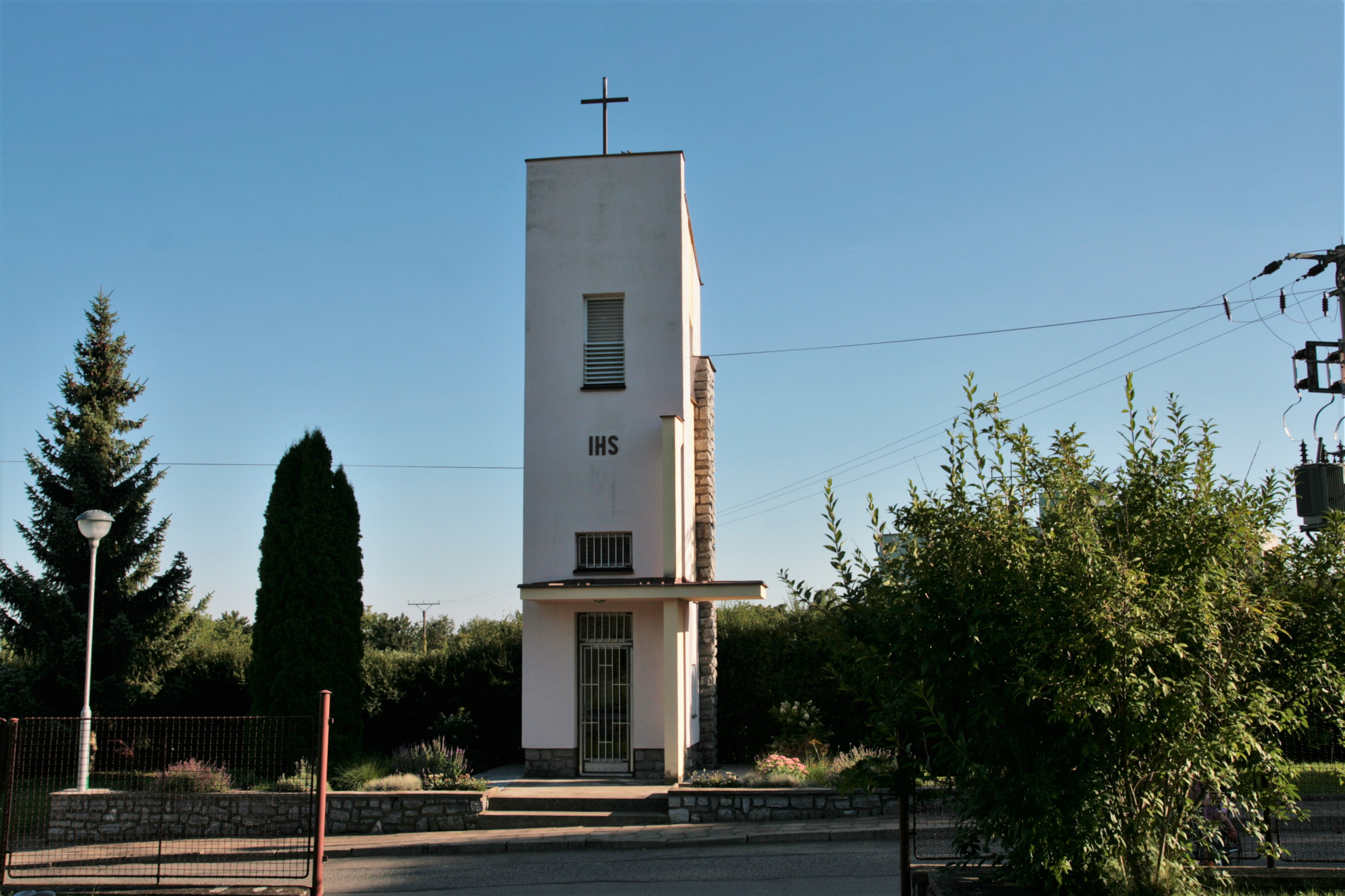 Zvonice v Jezerské ulici poblíž křižovatky s ulicí Na Rybníku, Pozořice, okres Brno-venkov.